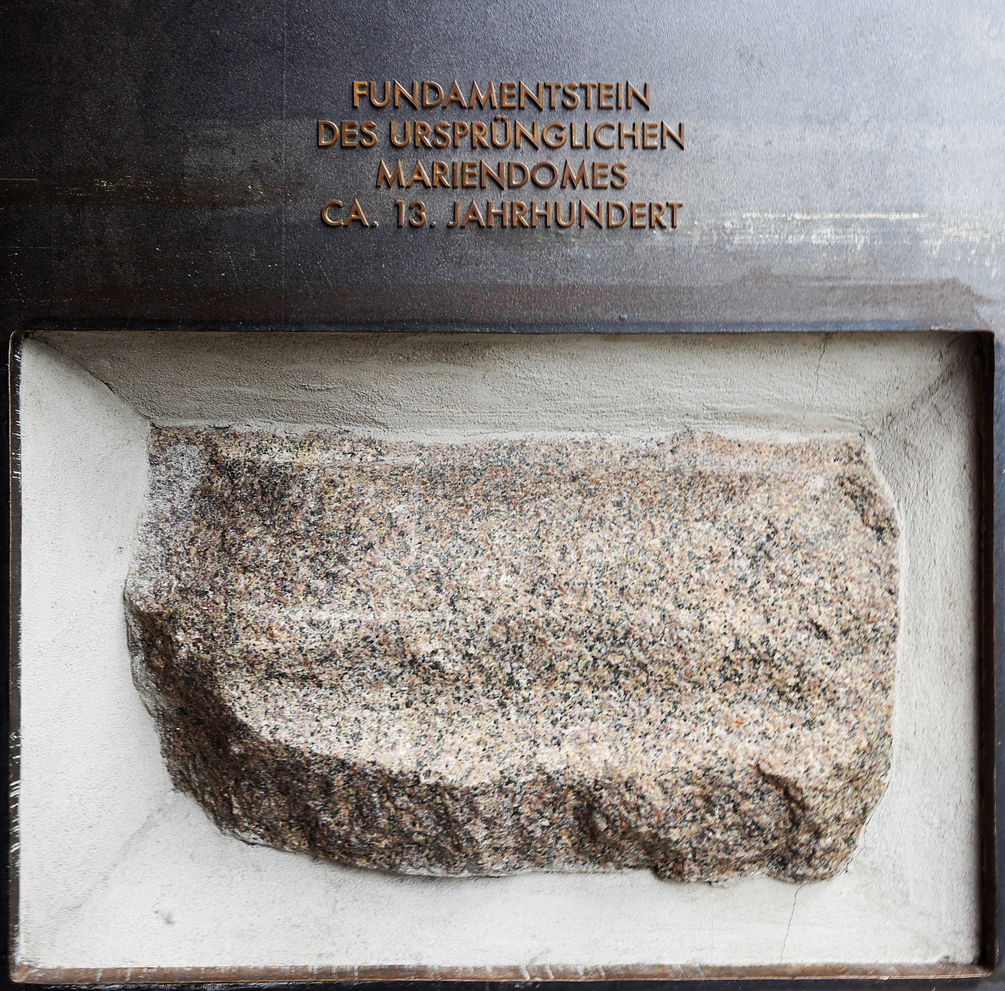 Fundamentstein des alten Hamburger Doms im Sankt-Marien-Dom in Hamburg